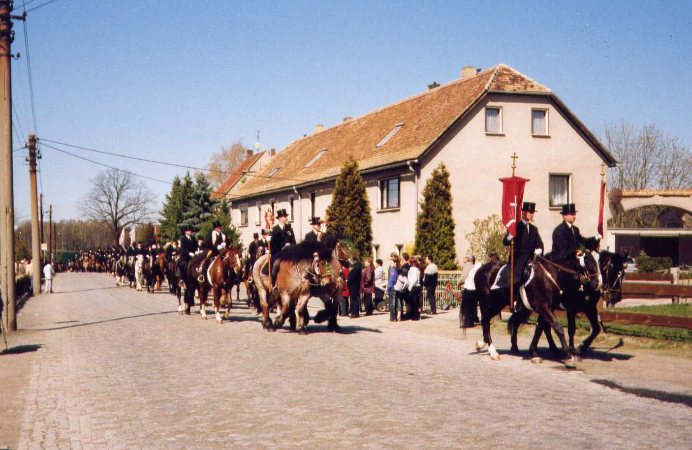 Osterreiter in Wendischbaselitz